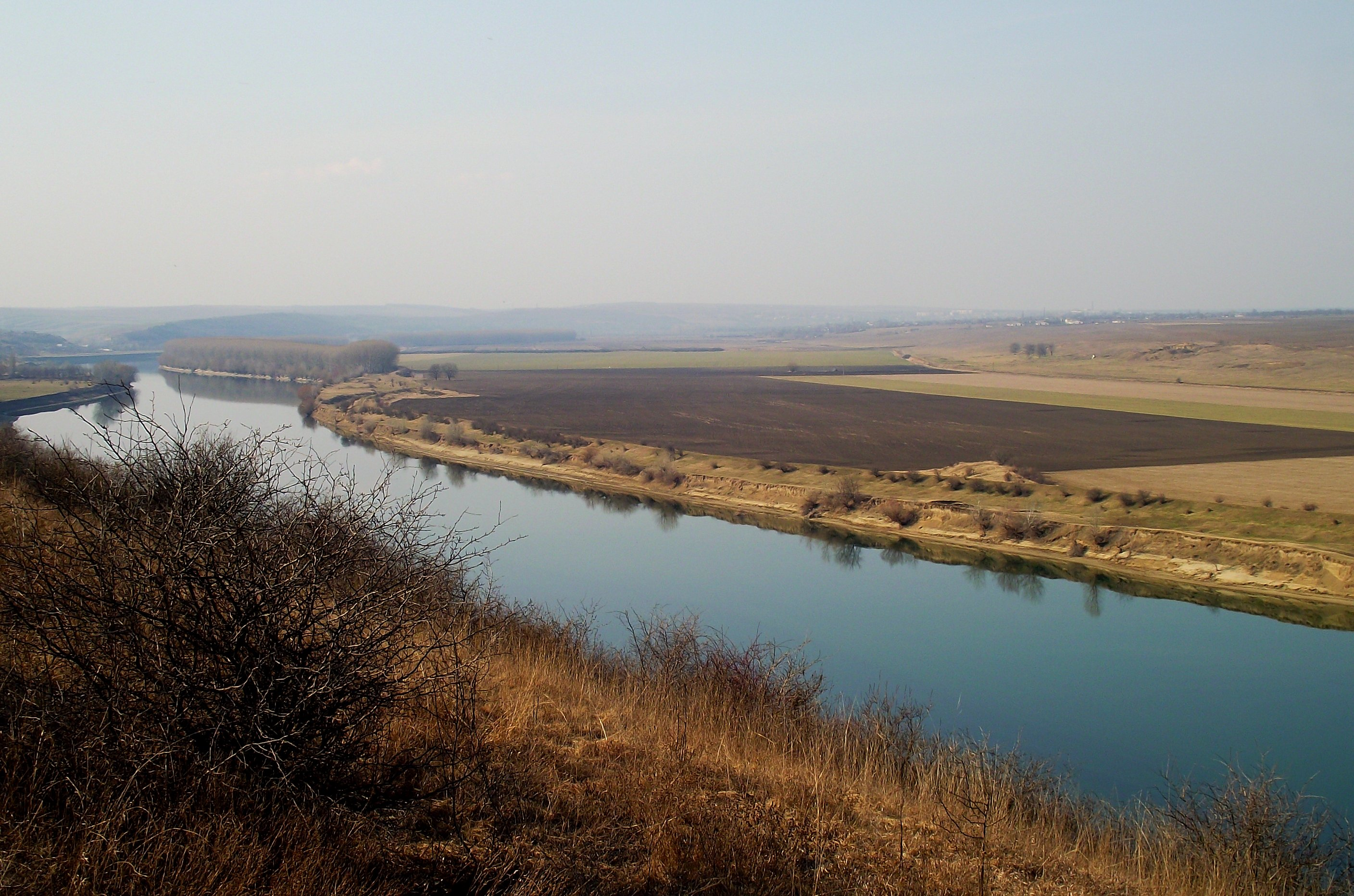 Unnamed Road, Tocmagiu, Moldova